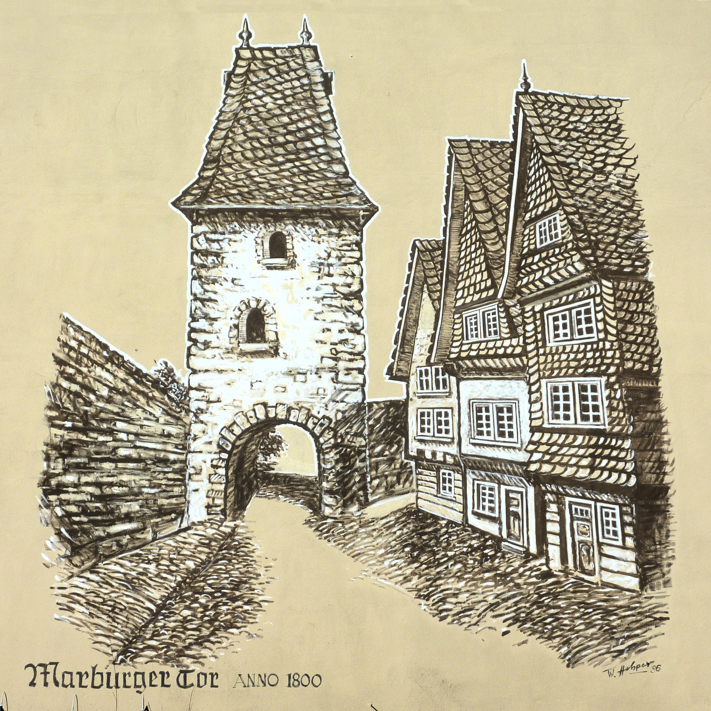 Historische Stadtbefestigung in Siegen/Westfalen: Das Marburger Tor etwa um 1800. Künstlerische Darstellung auf einem Wandgemälde von W. Helsper, 1986. Standort: Hausfassade am Marburger Tor (Straße) in Siegen.